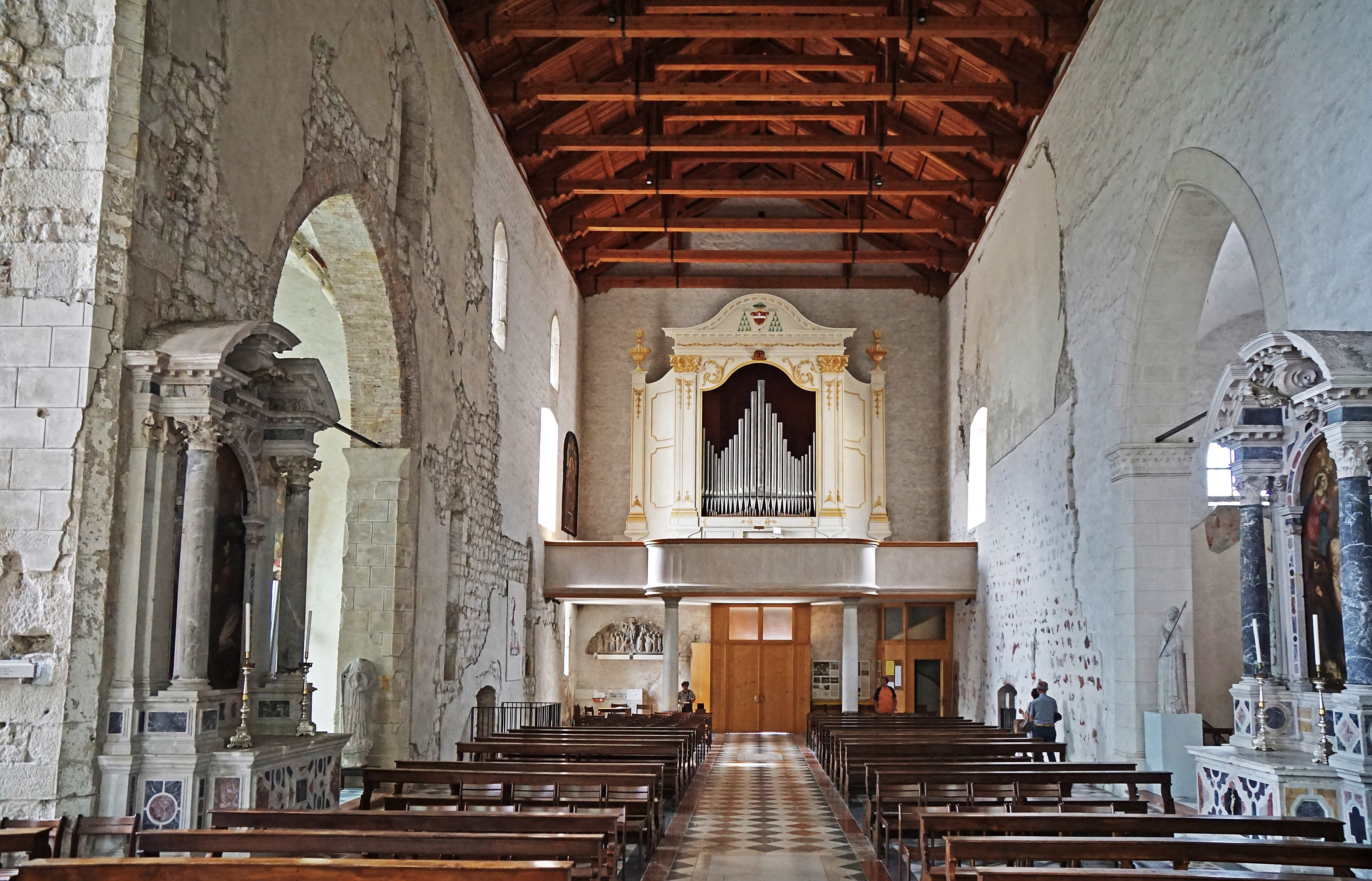 Dom von Venzone, Blick gegen die Orgelempore